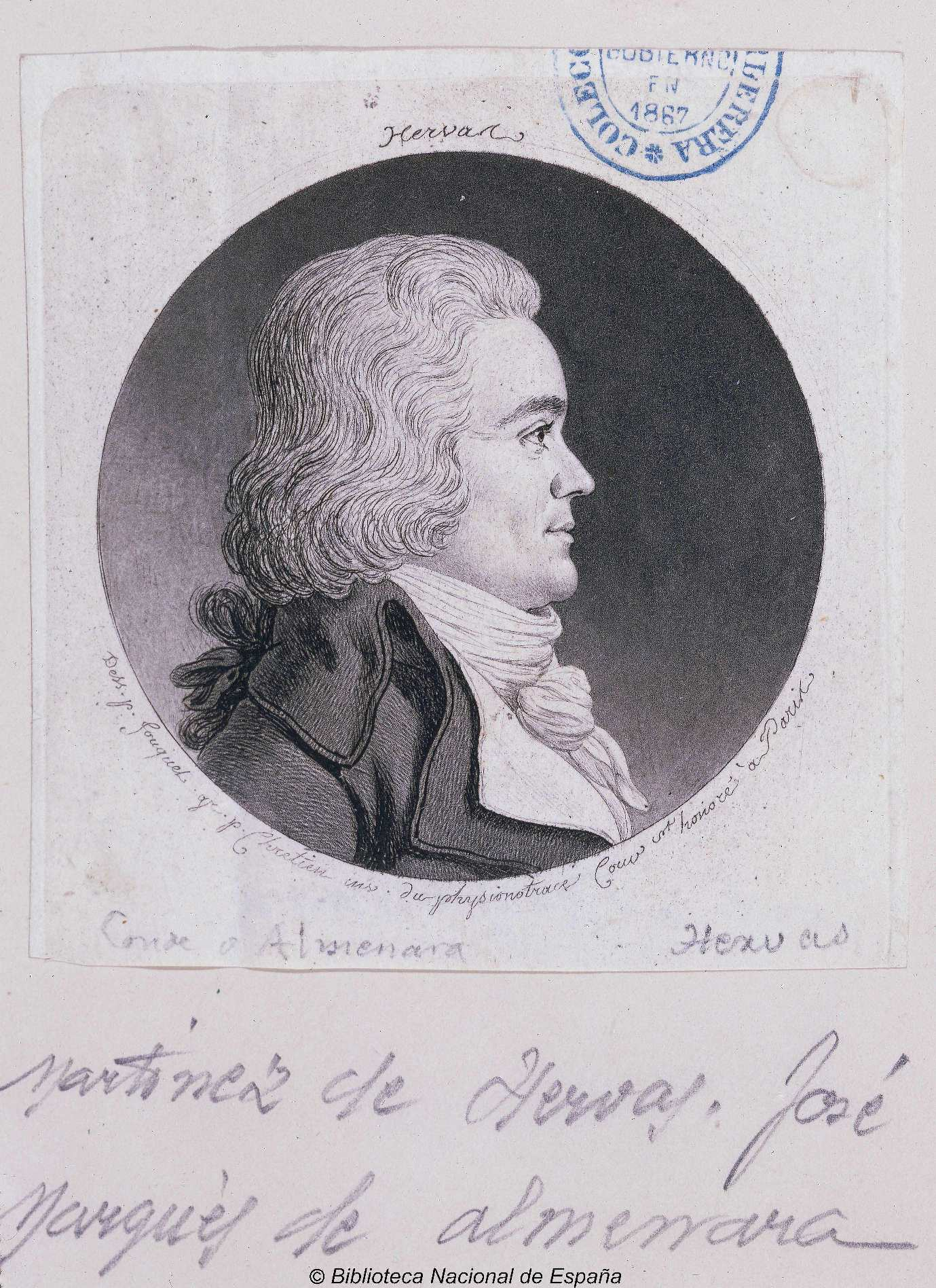 José Martínez Hervás, fisionotrazo de Gilles-Louis Chrétien por dibujo de Jean Fouquet (ft. 1781-1798). Biblioteca Nacional de España.